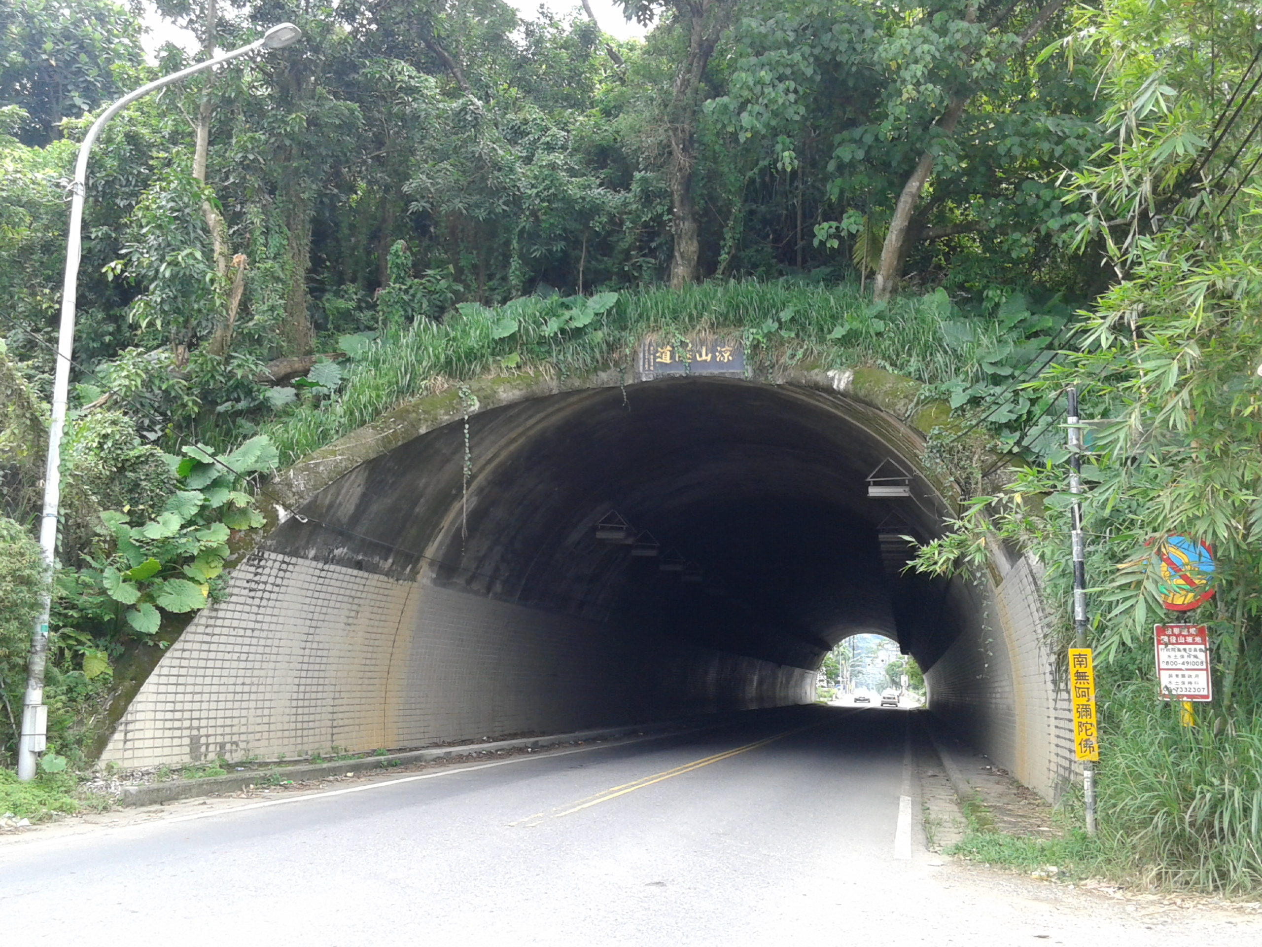 中文（台灣）: 涼山隧道 (縣道185號南下)